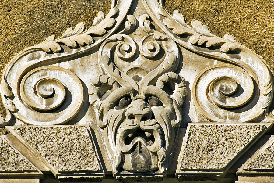 Pałac w Żaganiu